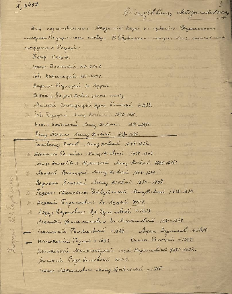 ІР НБУВ1 ф.X спр.6407 (Інститут рукопису Національної бібліотеки України імені В. І. Вернадського)